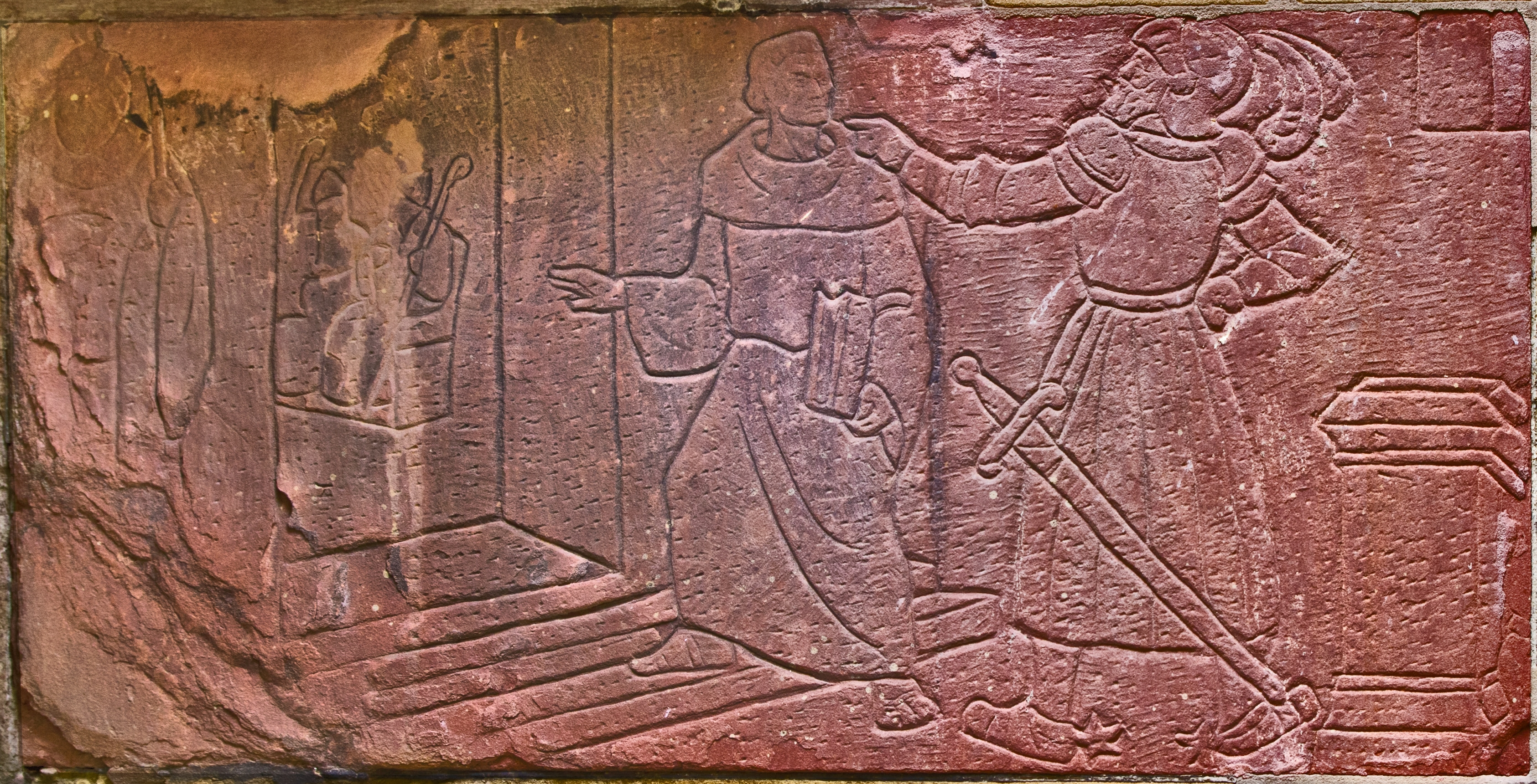 Reformationsdenkmal an der Südfassade der Hospitalkirche in Stuttgart, Wandrelief Nr. 11 (Nummerierung siehe file:Hospitalkirche, 002.jpg): Luthers Gang zum Reichstag in Worms 1521.